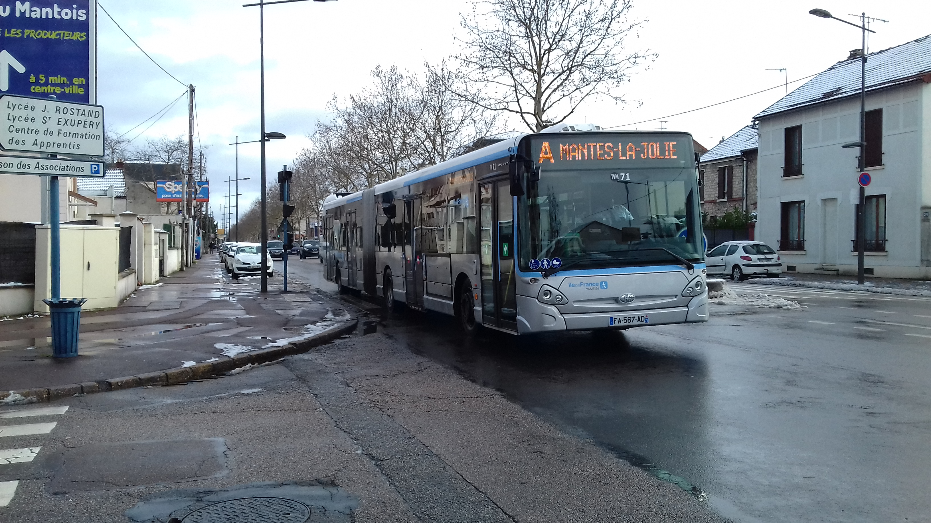 Heuliez GX 437 du réseau de bus TAM en Yvelines.